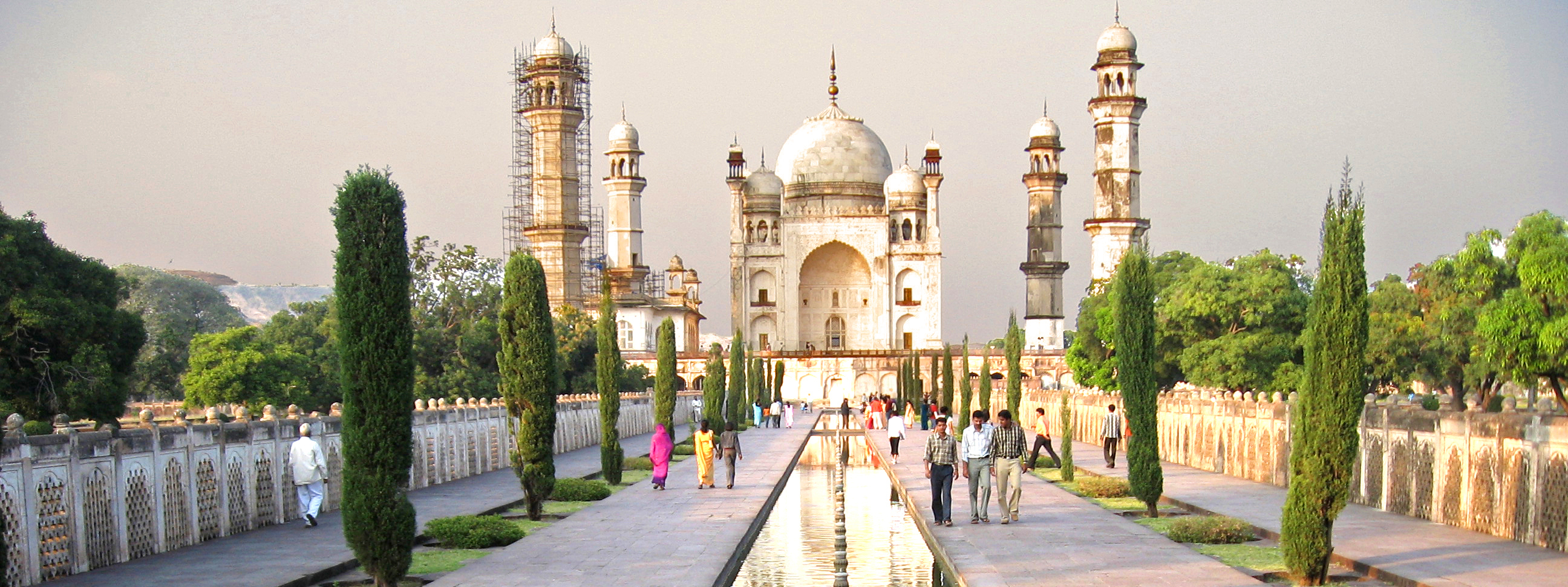 Bibi Ka Maqbara or Lady's tomb